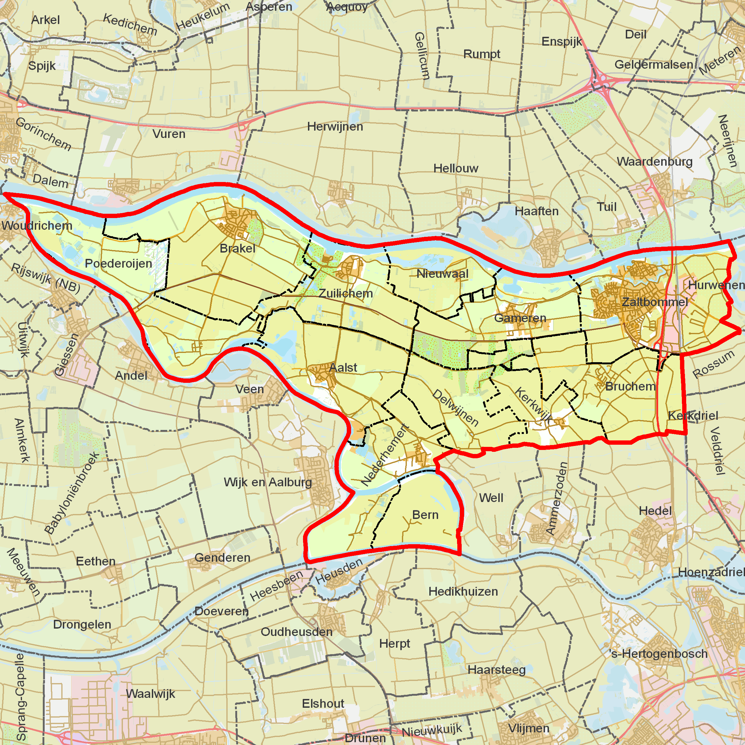 BAG woonplaatsen - Gemeente Zaltbommel.png